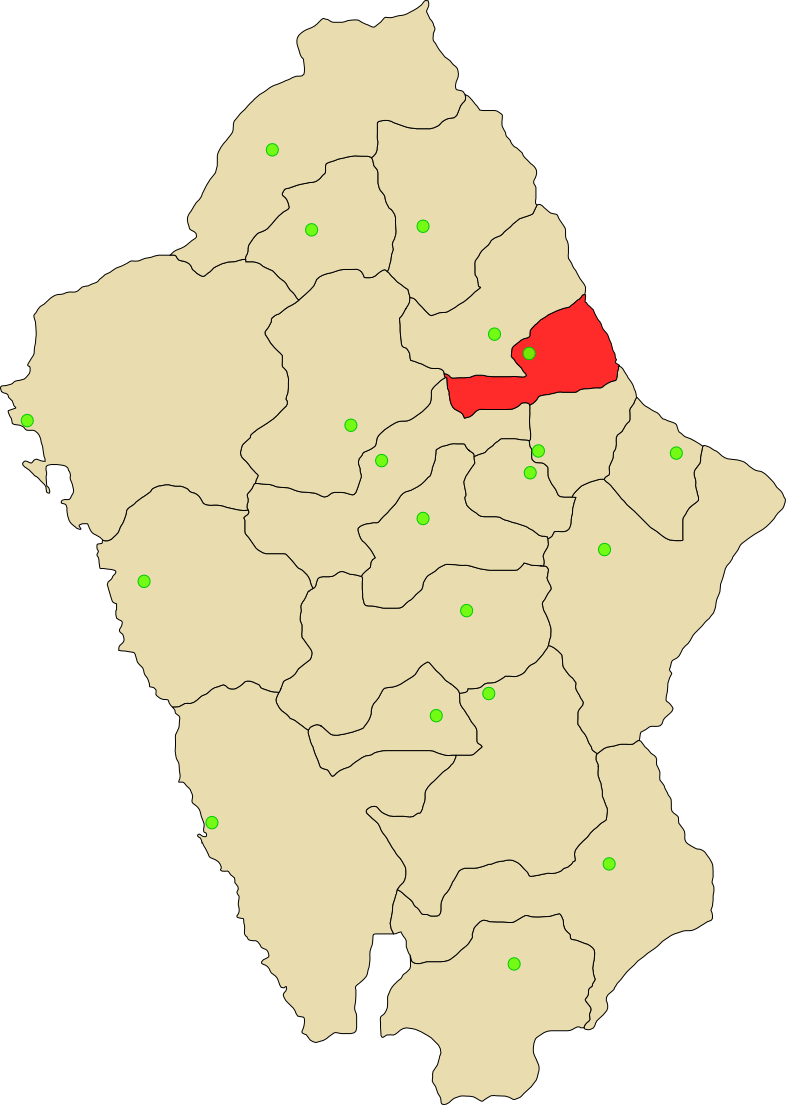 Provincia de Mariscal Luzuriaga de departamento Ancash